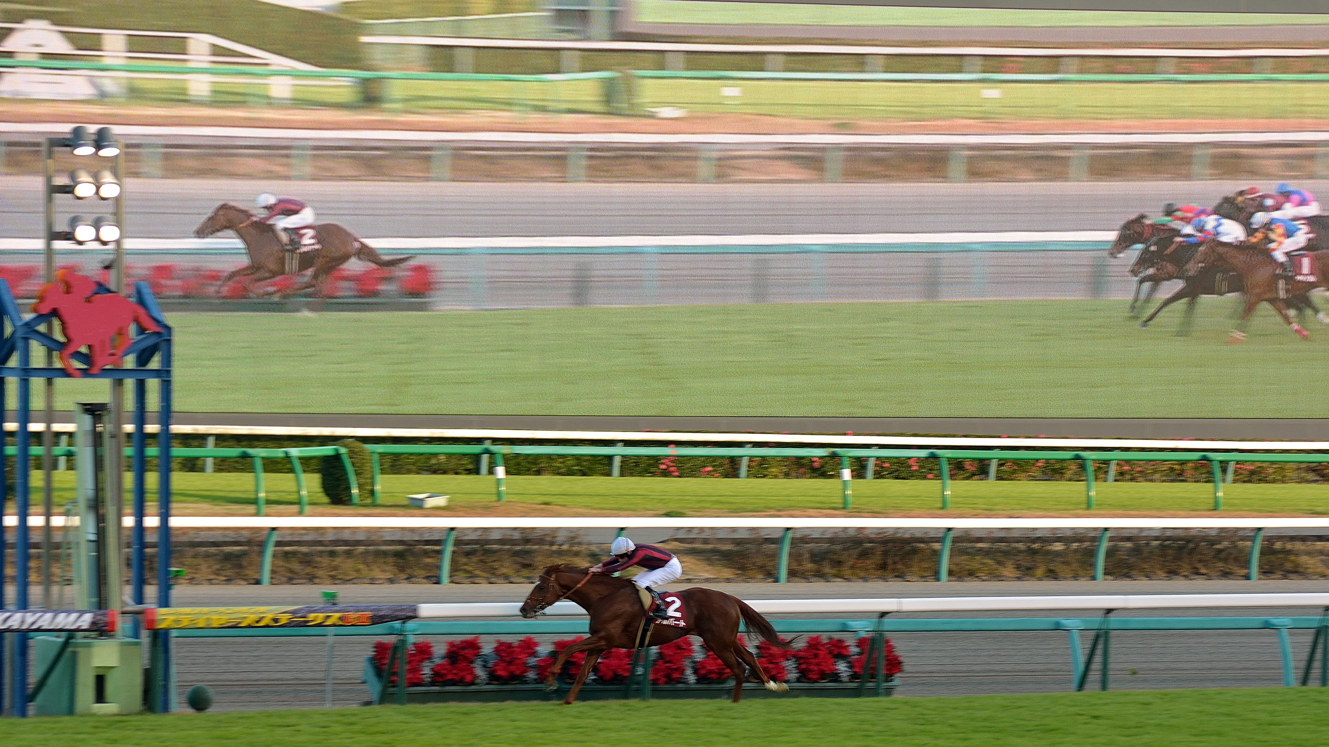 2015年12月5日（土）に中山競馬場の第11競走で行われた「第49回ステイヤーズステークス」で、ゴール板前の3周目（ゴール直前）の状況を、観客席から撮影したもの。